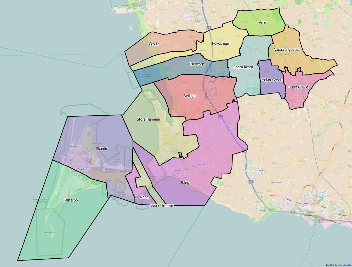 Distriktsindelningen i Vansbro kommun 'World file: 37.2044141186038928 0 0 -37.2044141186038928 1419237.64290169789455831 7465387.04776867479085922